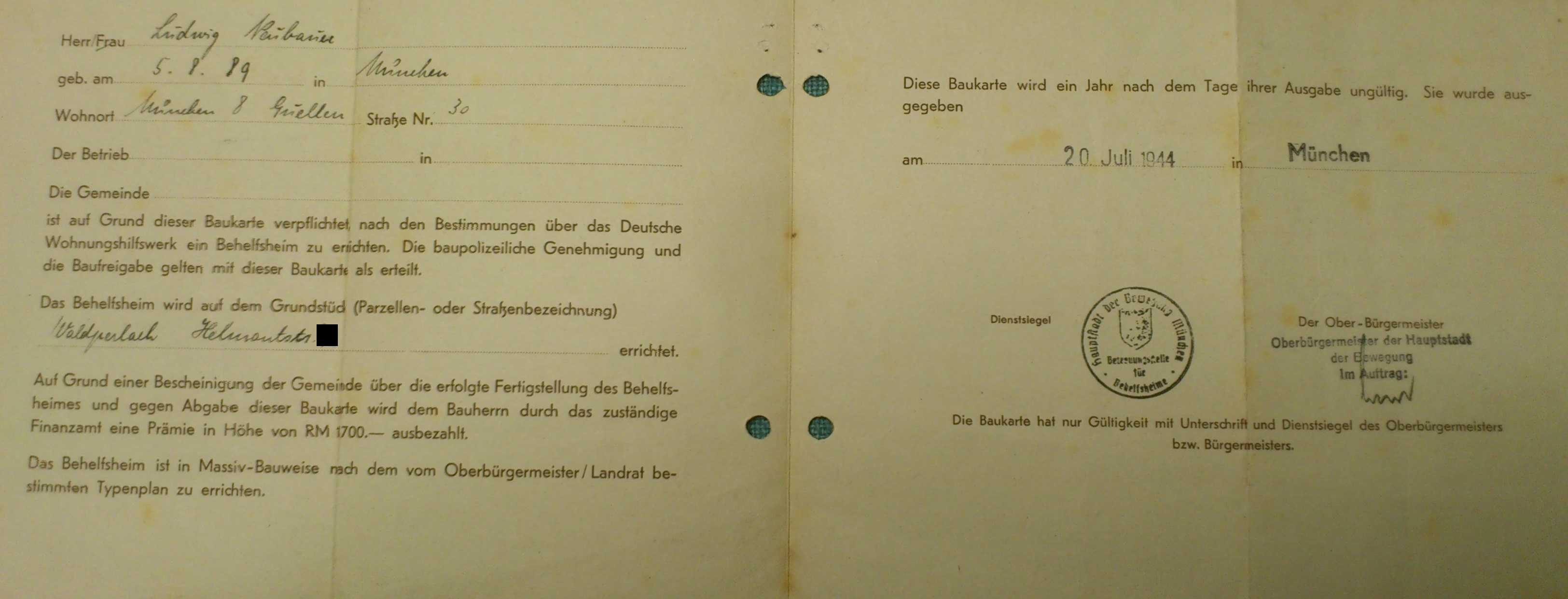 Deutsches Wohnungshilfswerk Baukarte